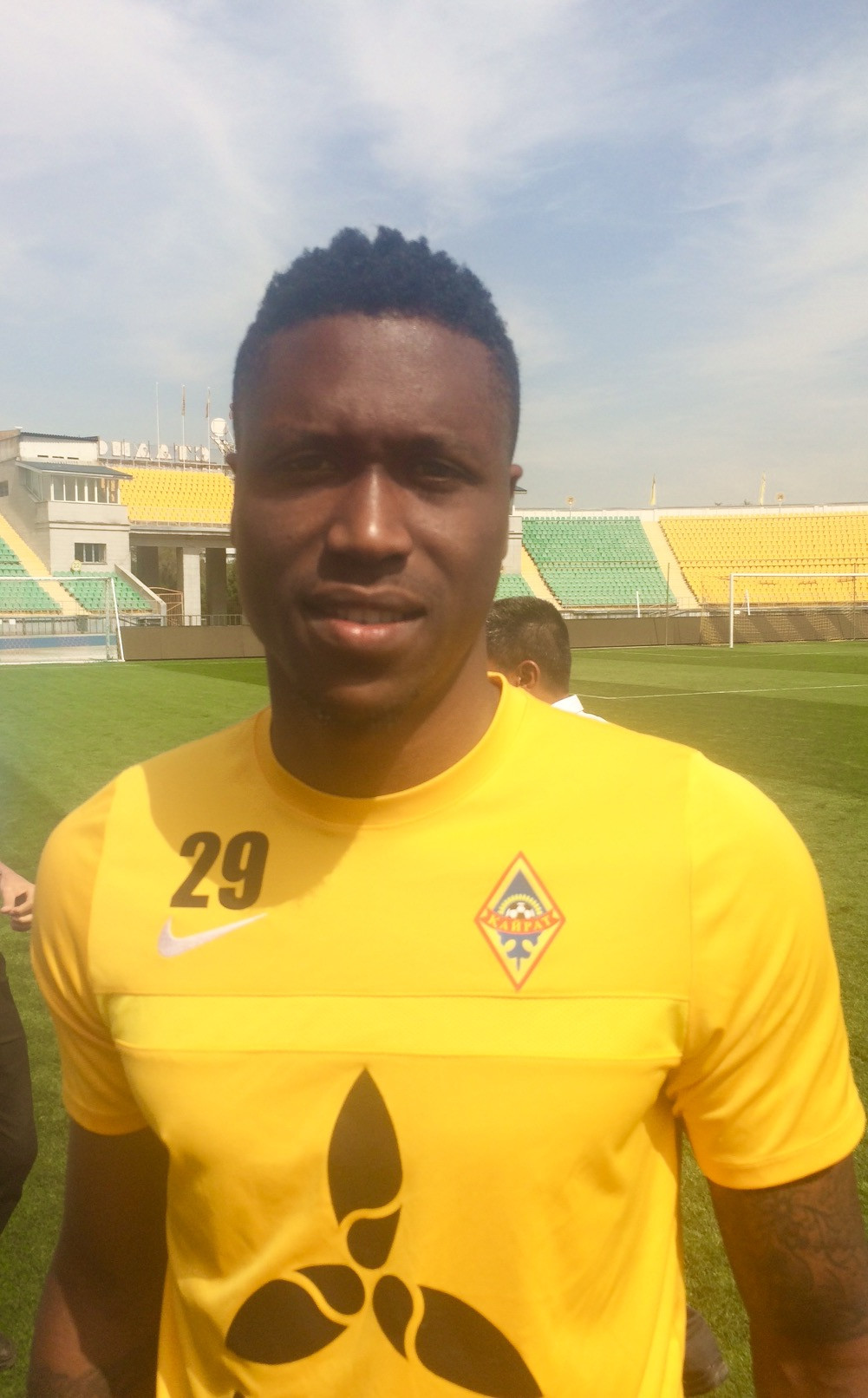 Шелдон Бато, тринидадский футболист